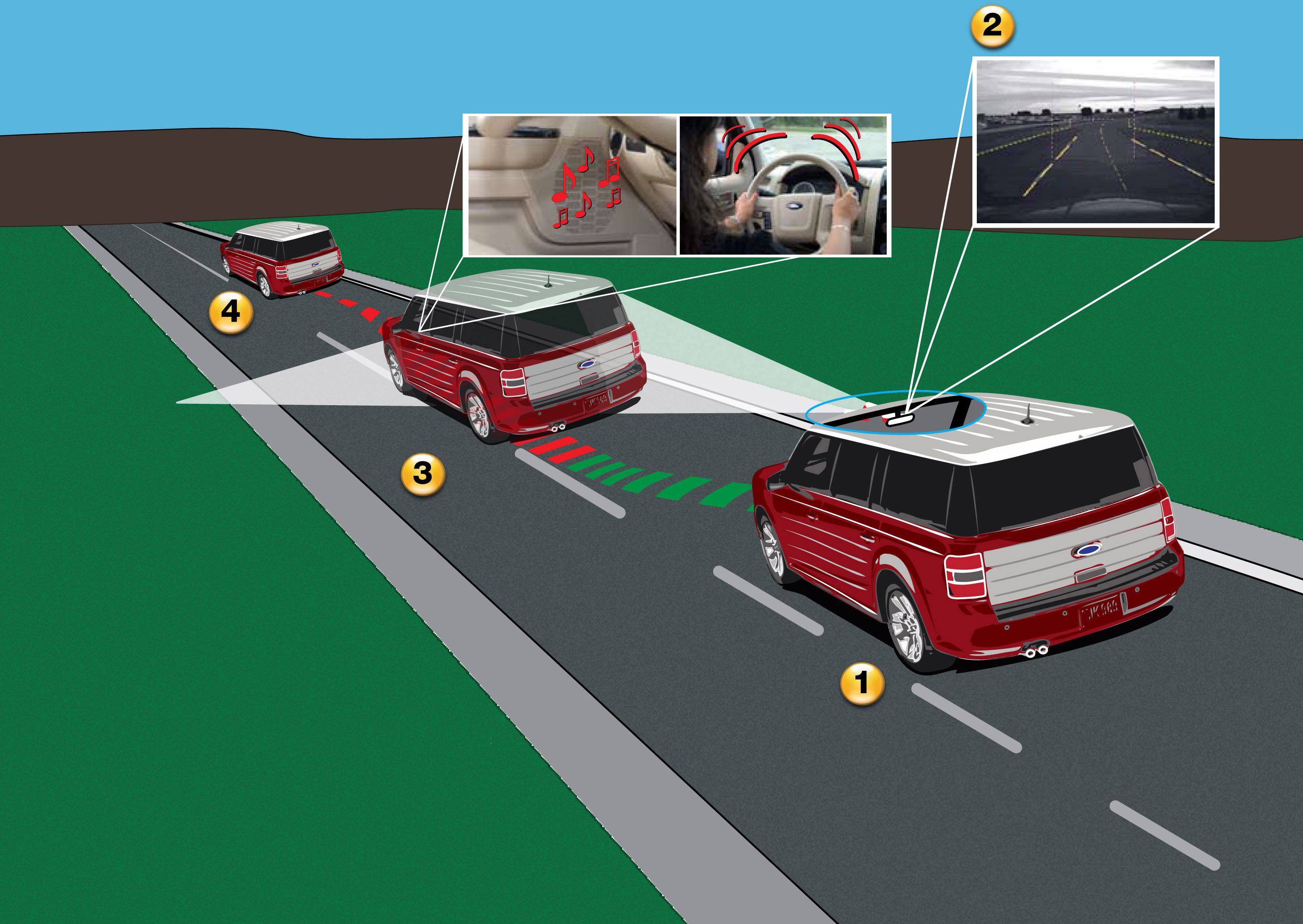 Schéma expliquant le système de dépassement de ligne droite